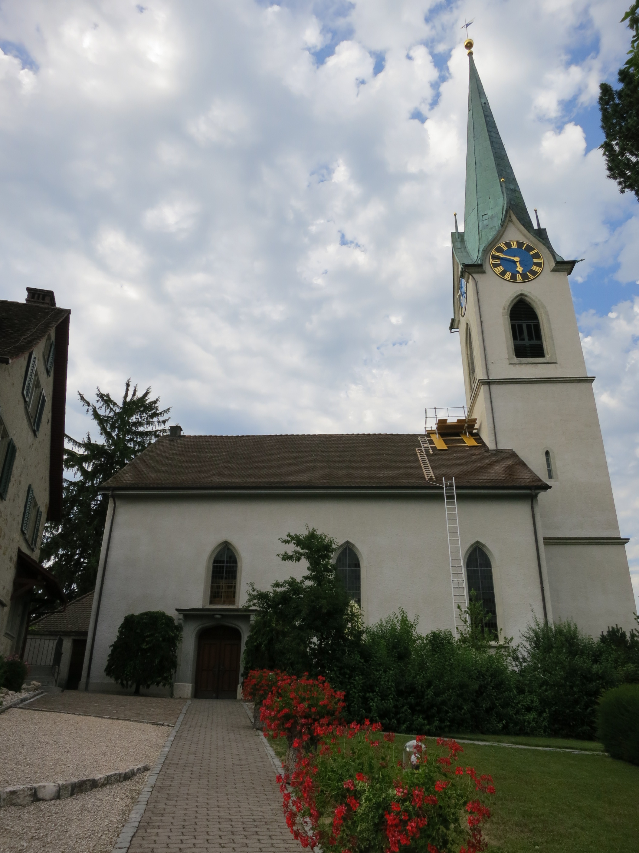 Kirche, Niederweningen ZH, Schweiz